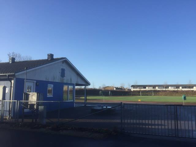 Svedalagårdens Idrottsplats.